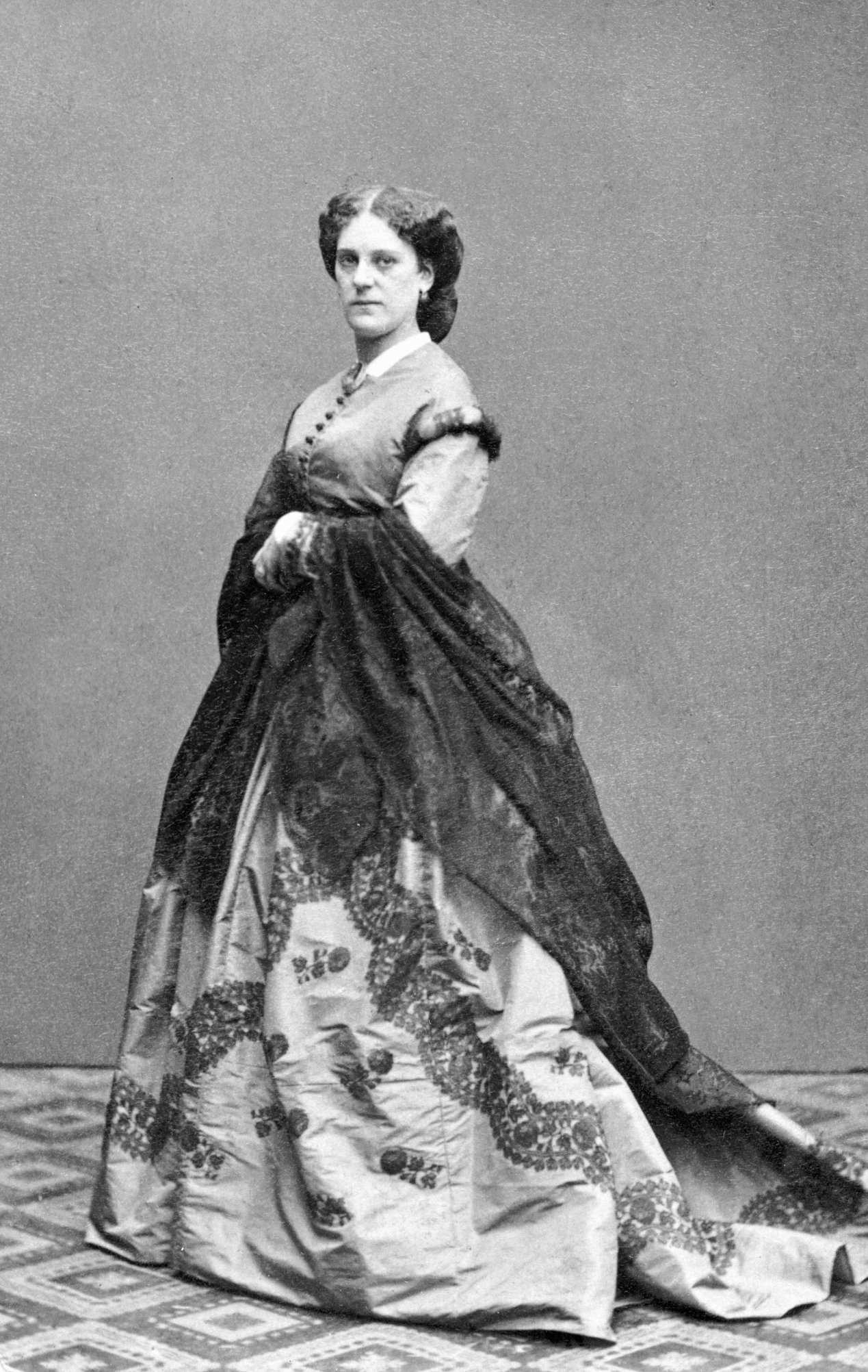 Mina Gelhaar, sångare vid Kungliga Operan 1863